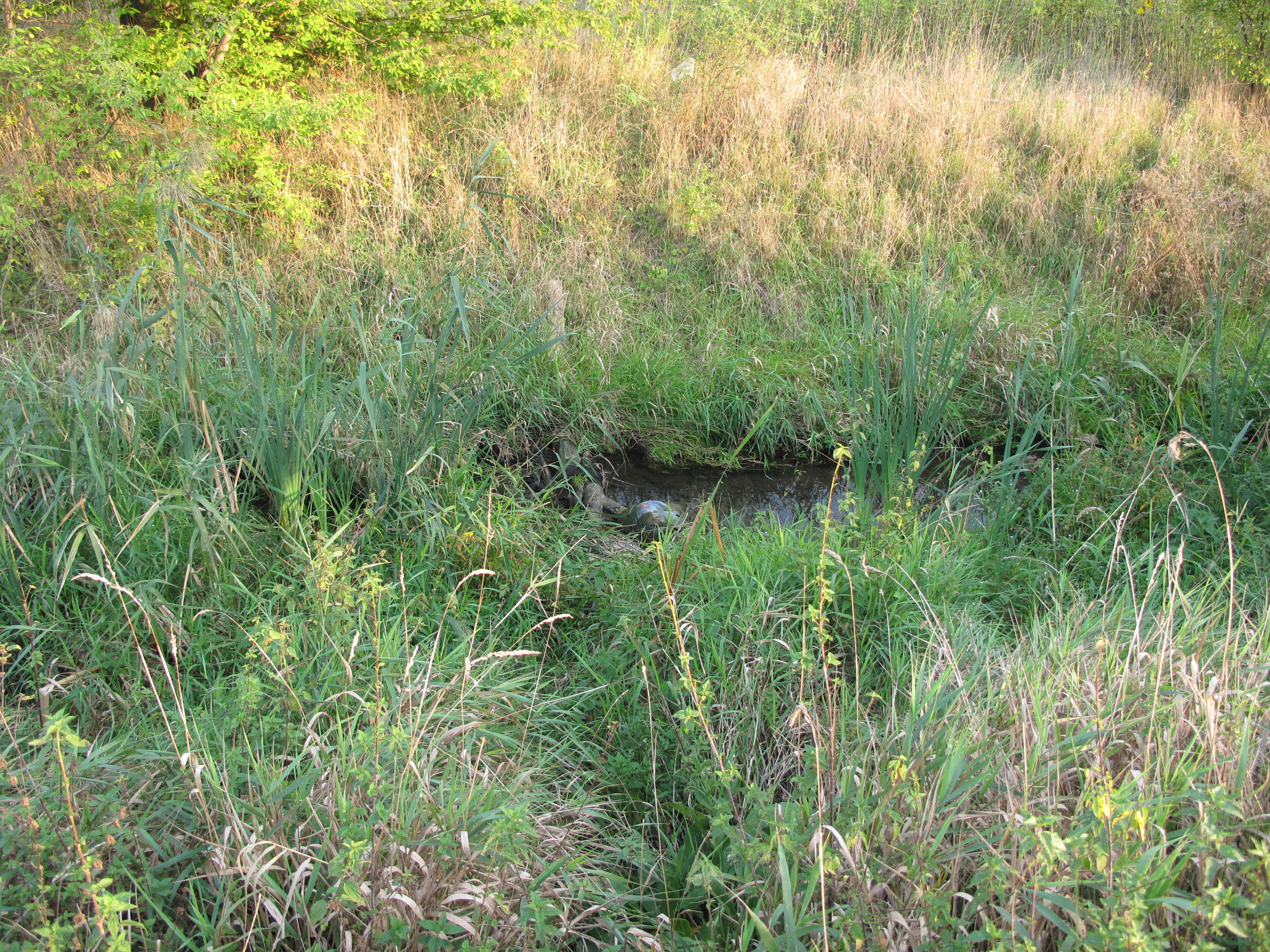 Potok Chvalka. Praha, Česká republika.